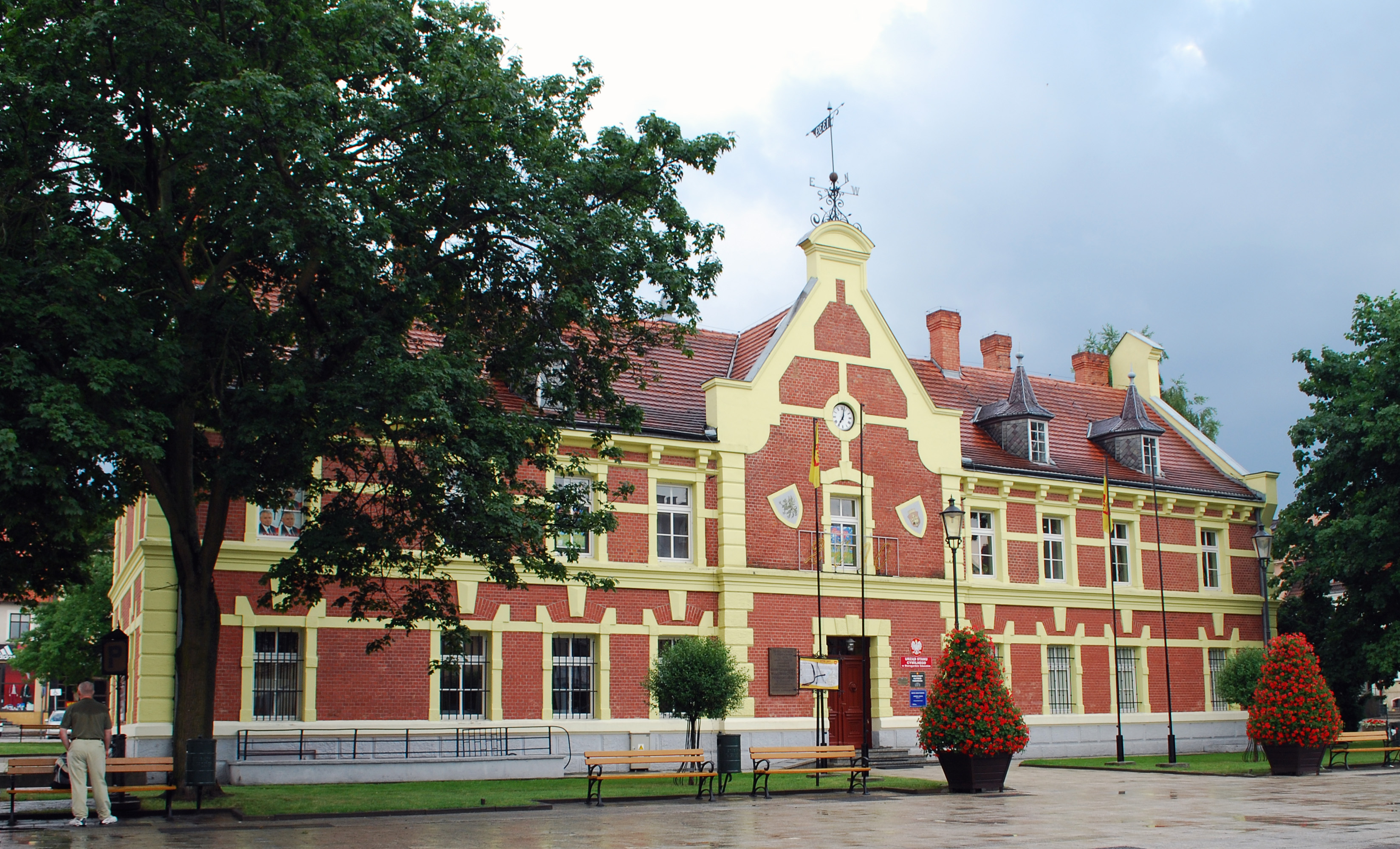 Ratusz Starogardzie Gdańskim.